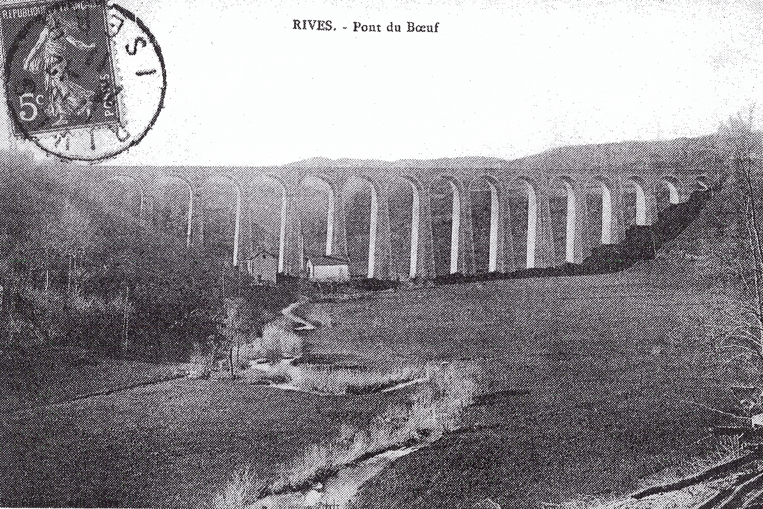 Ancienne carte postale du viaduc du Pont-du-bœuf, viaduc ferroviaire sur la Fure (ligne de Lyon-Perrache à Grenoble / Rives et Réaumont), Isère, France